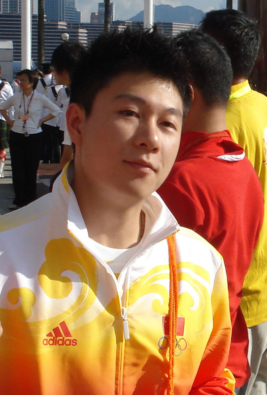 Li Xiaopeng